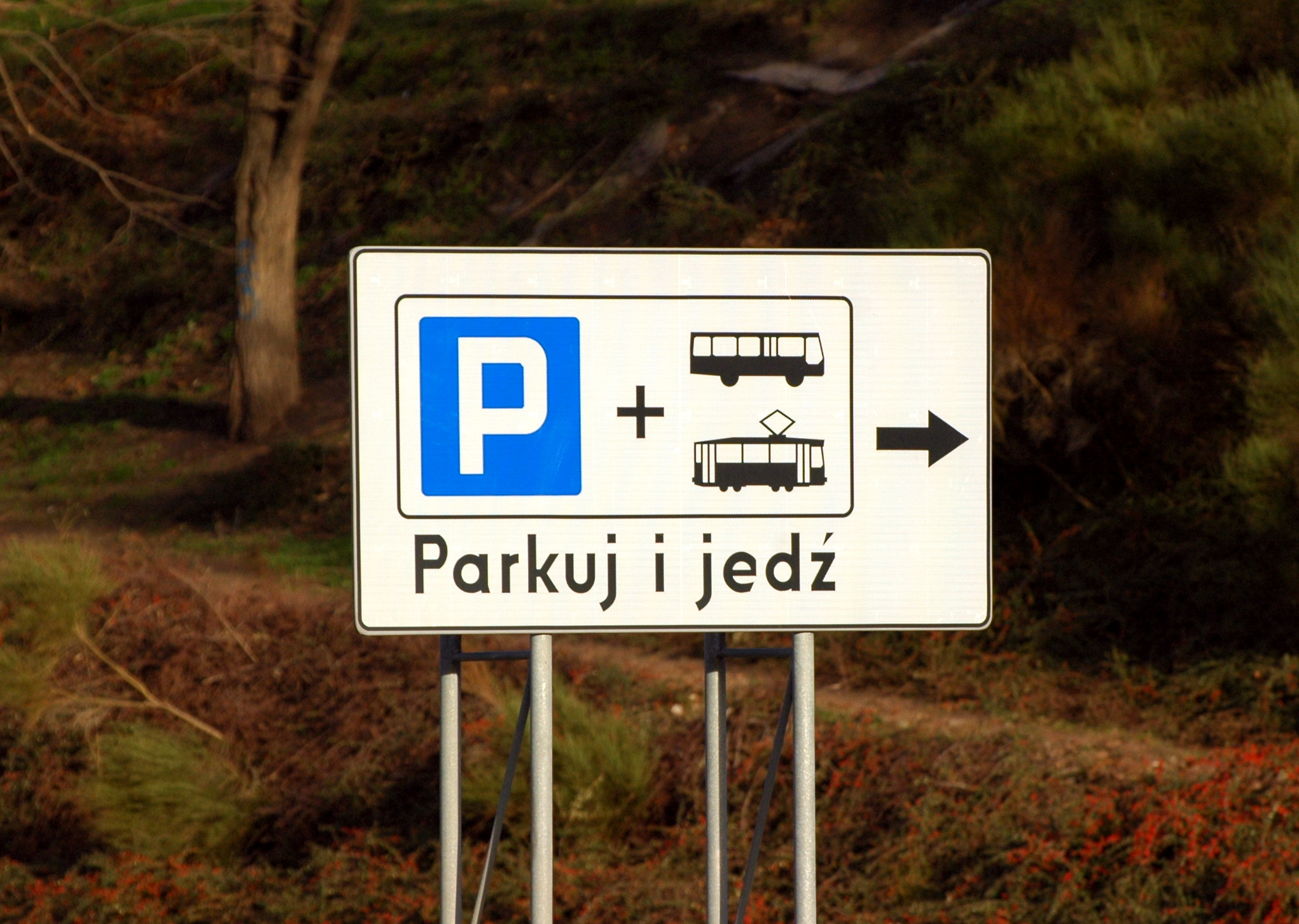 Wrocław w 2015 roku